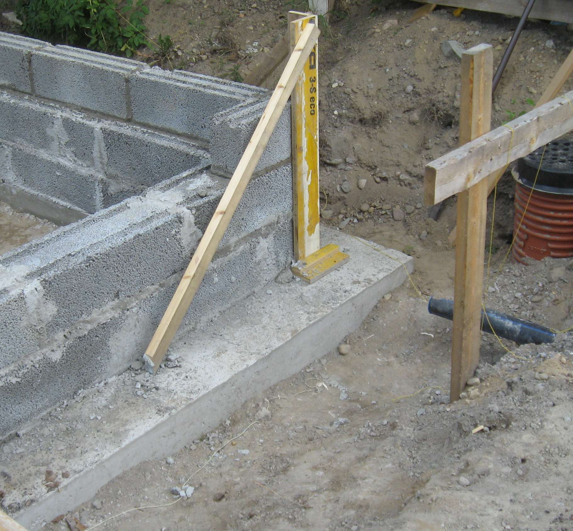 Antura